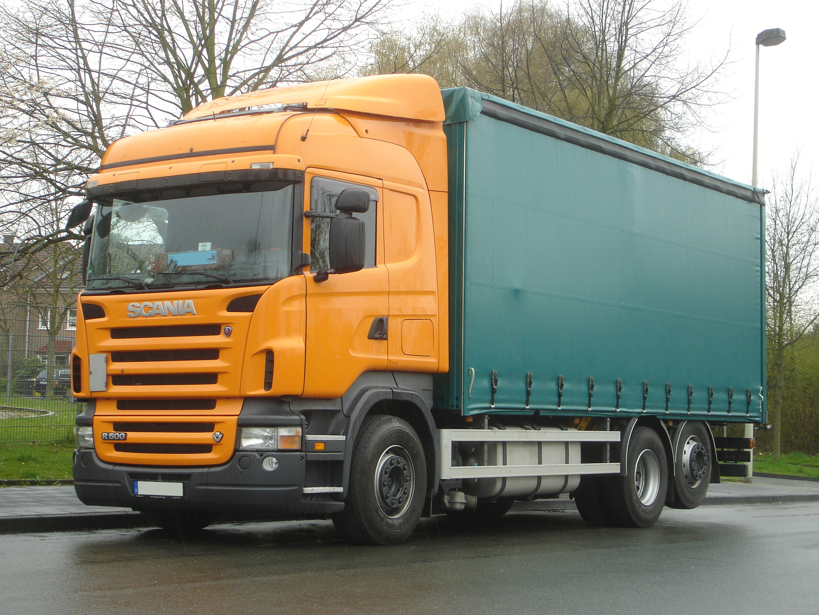 Scania R 500 Fernverkehrs-Lkw als Curtainsider-Pritsche